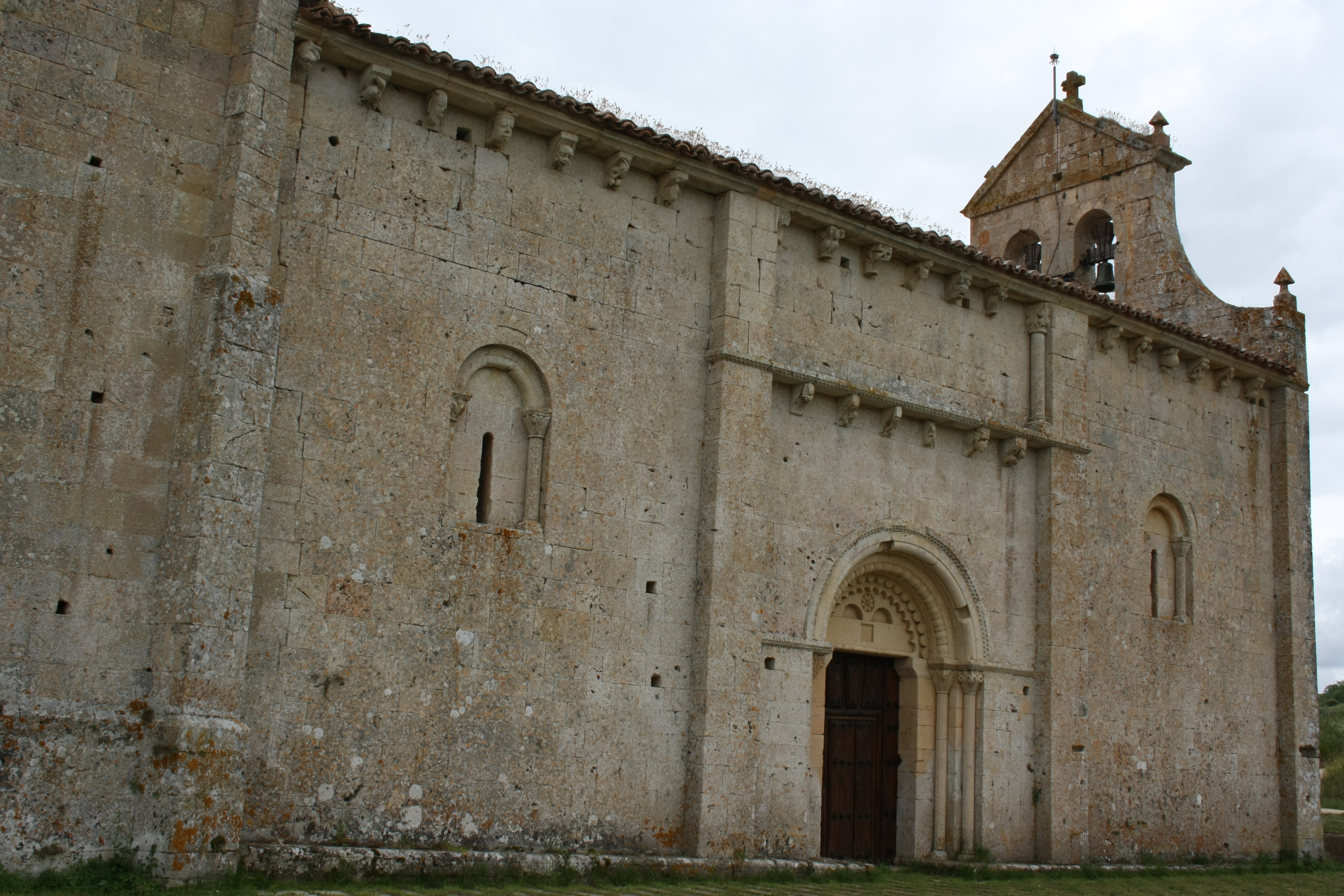 Romanische Kirche Ermita de la Virgen de la Oliva in Escóbados de Abajo, Ansicht von Süden